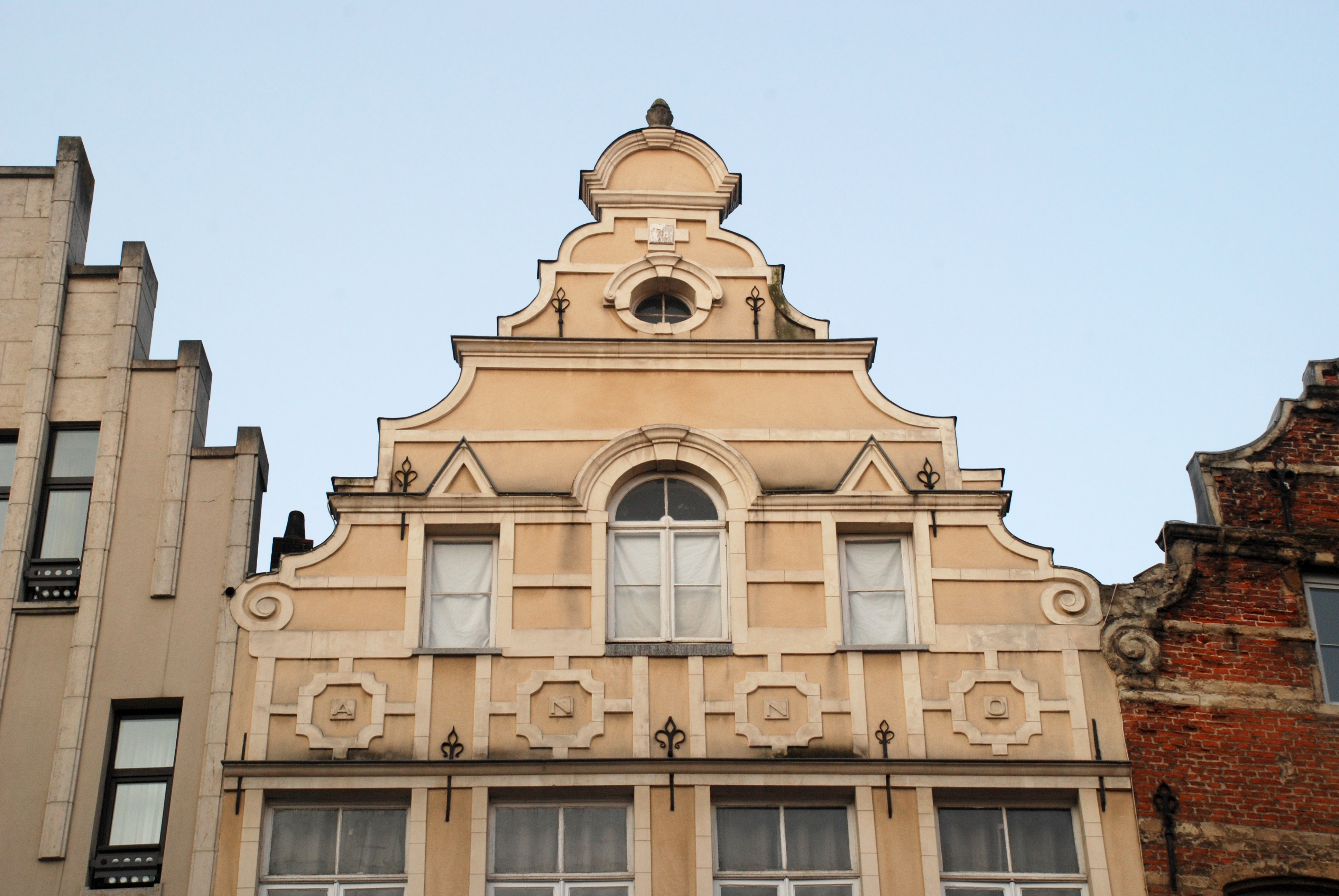 Belgique - Bruxelles - Place de la Vieille Halle aux Blés n°31 - Maison du Cornet (Den Hoorn)